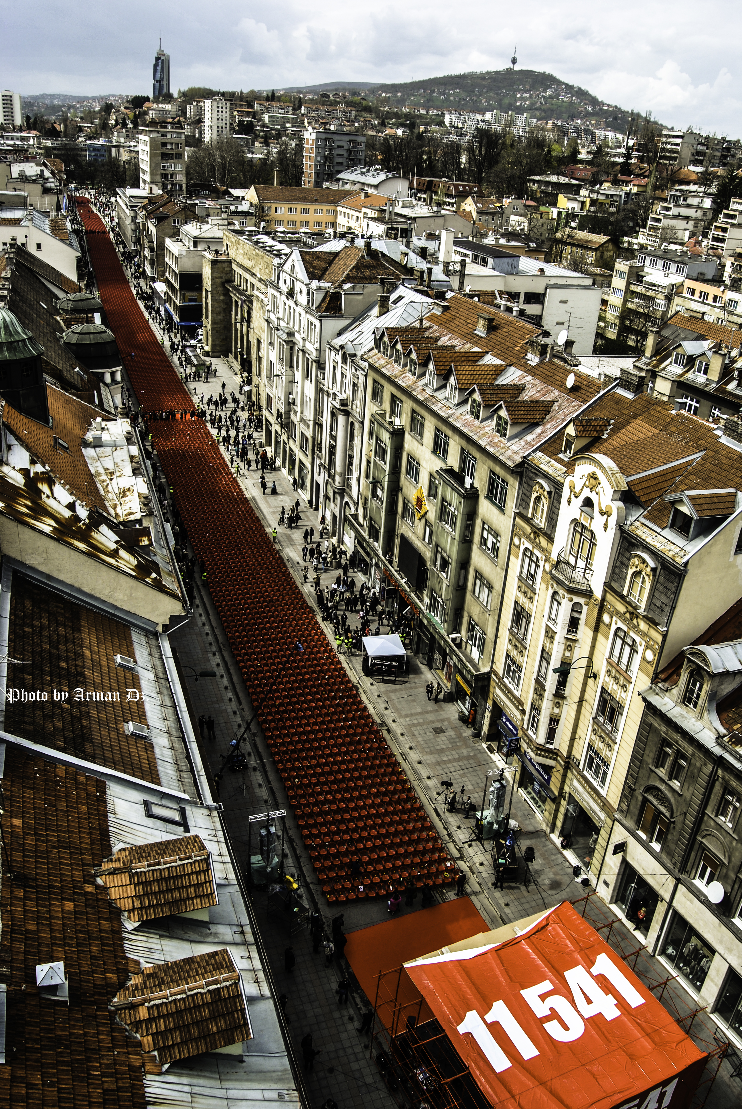 Sarajevo Red Line 2012